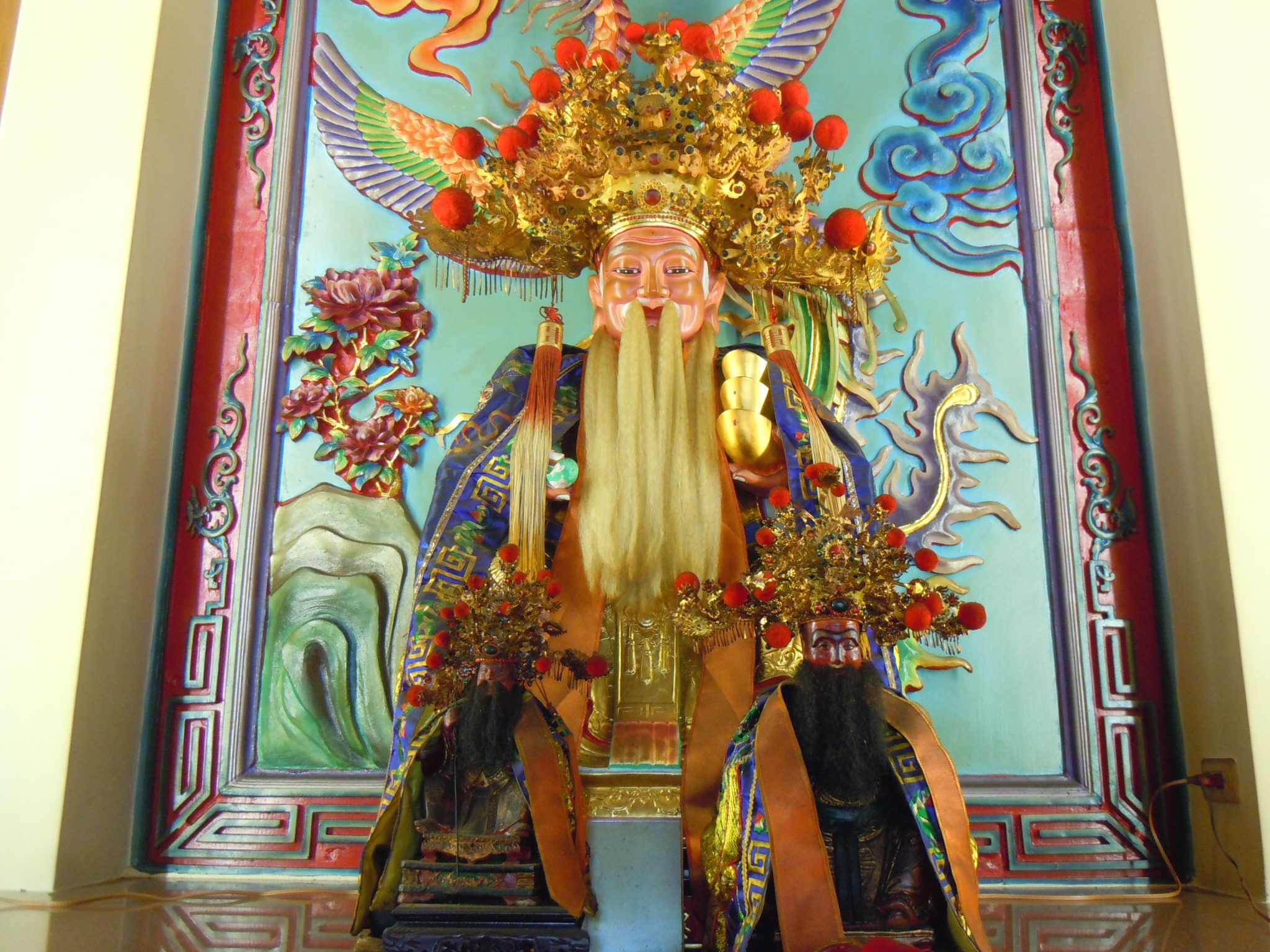 中文（台灣）: 土地神又可稱謂伯公、大伯公、福德正神、福德老爺、土地公公、土地伯公、福德公、土地公、土地爺、福德、土公、土地、土伯、土正、社神、社公、社官等。